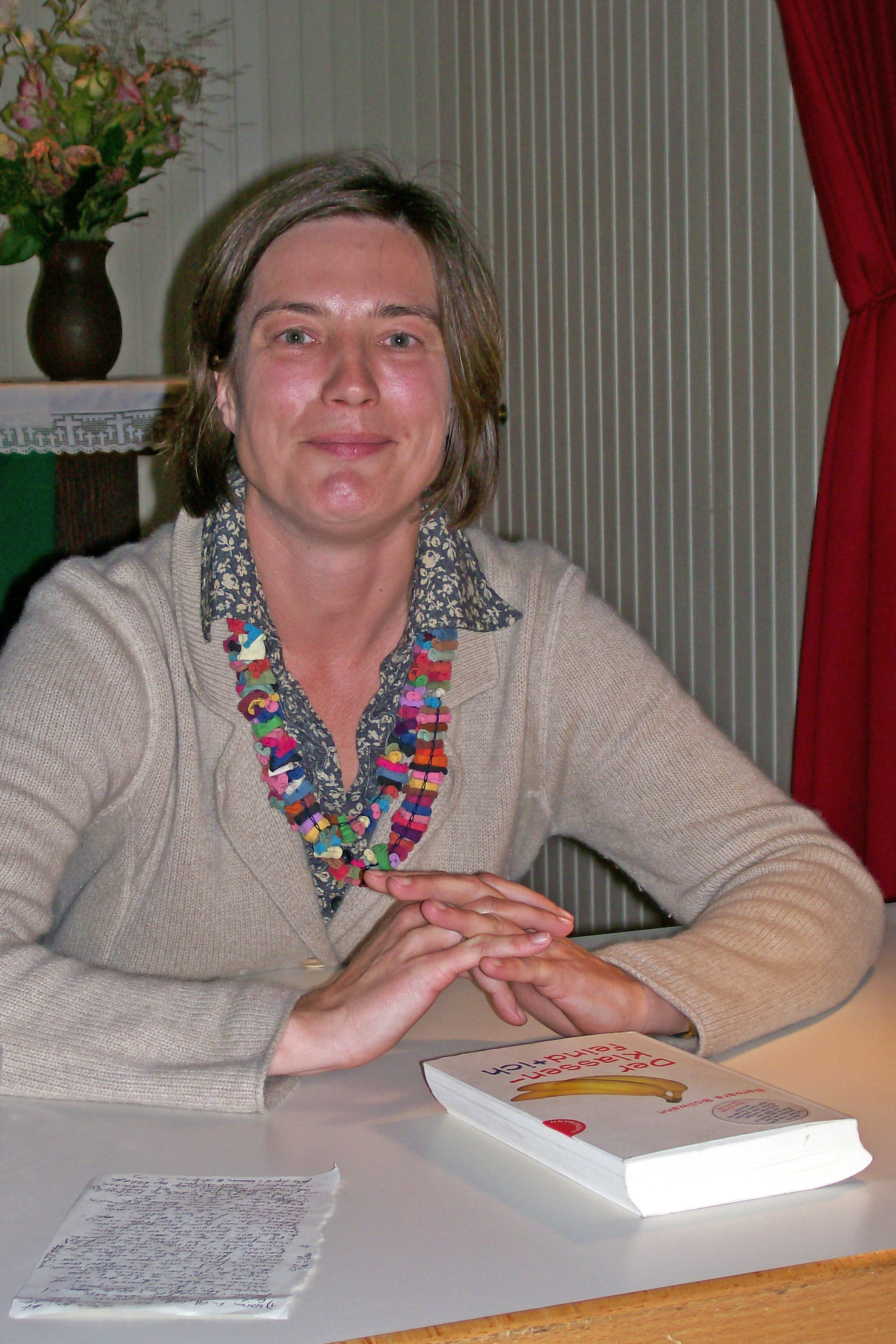 Sujet:D'Barbara Bollwahn am Oktober 2007 bei enger Liesung an der Flussschifferkierch zu Hamburg